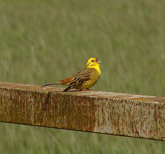 Emberiza citrinella, Yellowhammer (male)